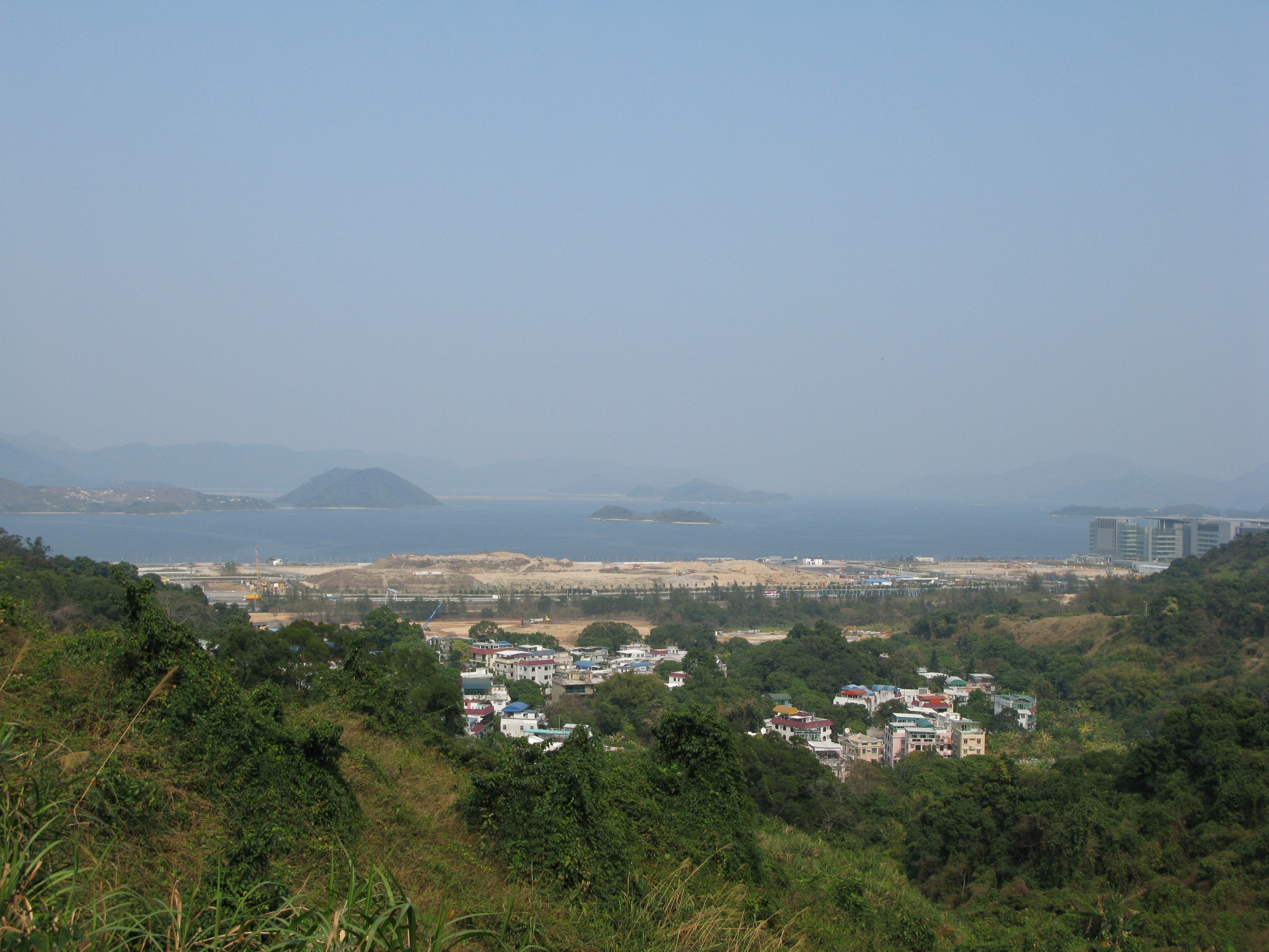 Pak Shek Kok